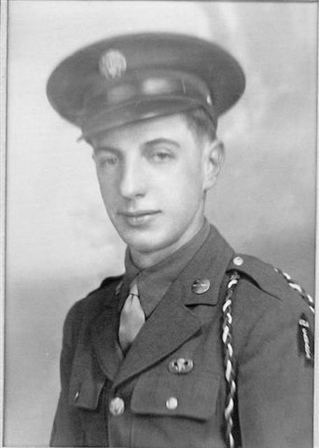 Foto raffigurante il sergente Frank Harvey